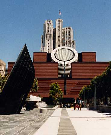 San Francisco museum of Modern Art; eigen foto